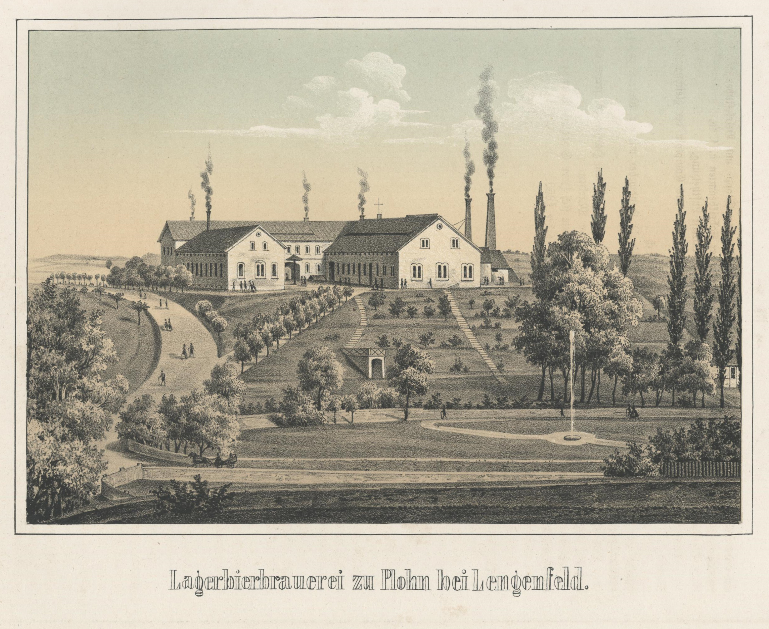 Lagerbierbrauerei zu Plohn bei Lengenfeld aus: Album der Sächsischen Industrie Zweiter Band